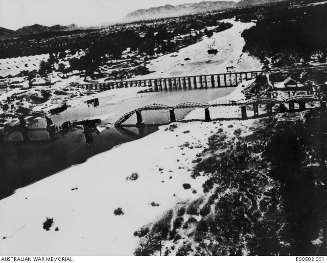 Mosty na rzece Kwai (Khwae Yai) po nalocie alianckim w 1945 roku.